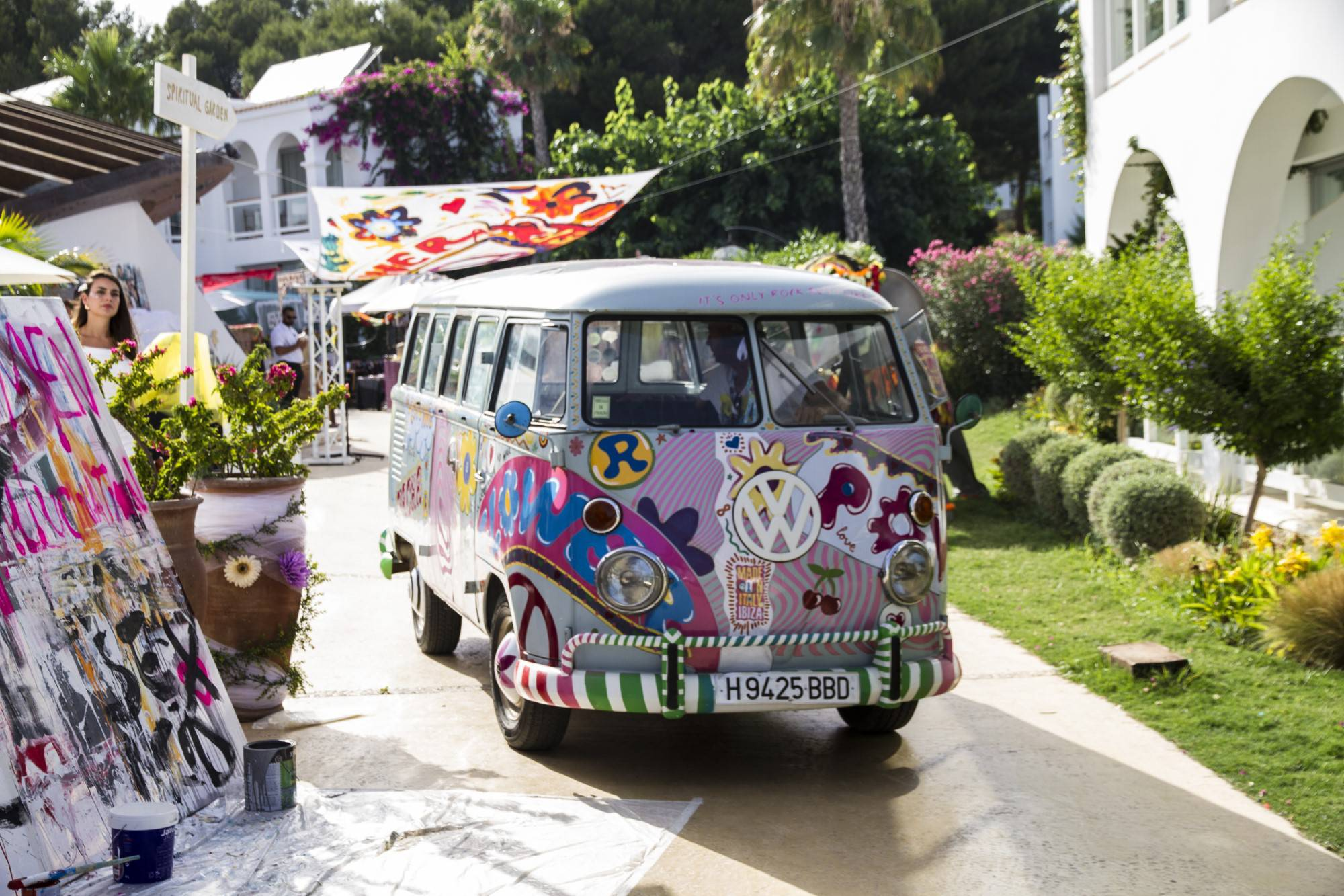 Furgoneta hippy en el 'Flower Power Beat Experience' 13 de julio de 2017, Ibiza.